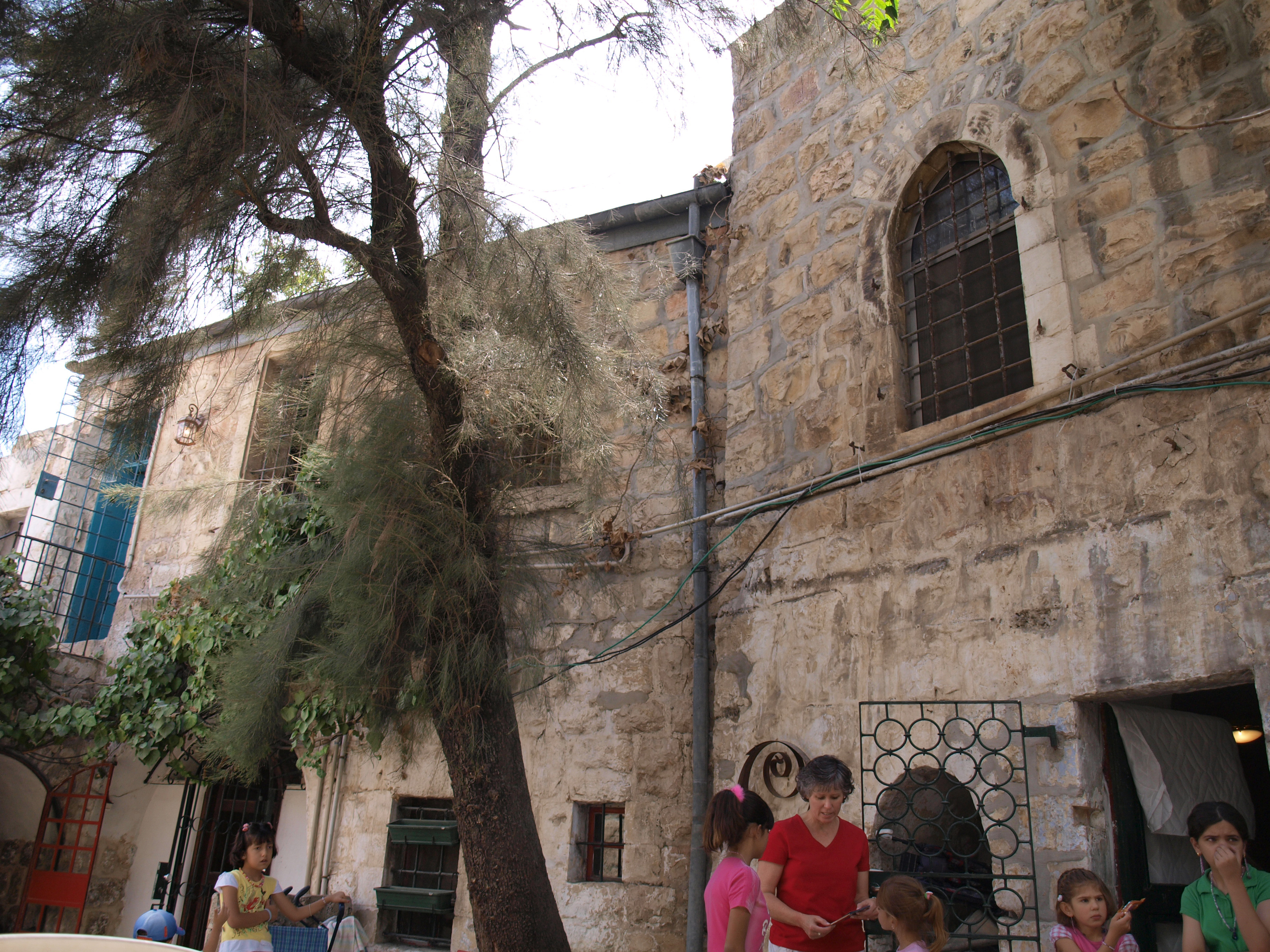 Marienstift Children Hospital, Jerusalem